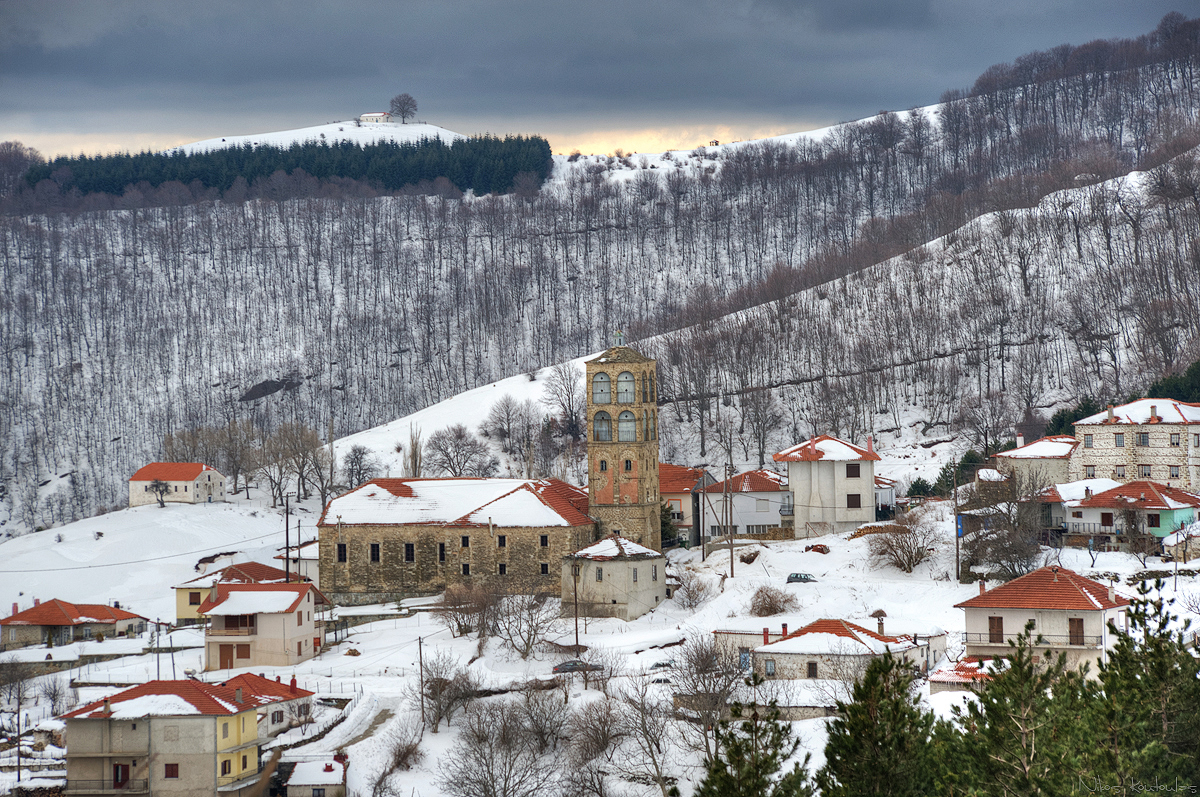 Клисура, Костурско, през зимата.